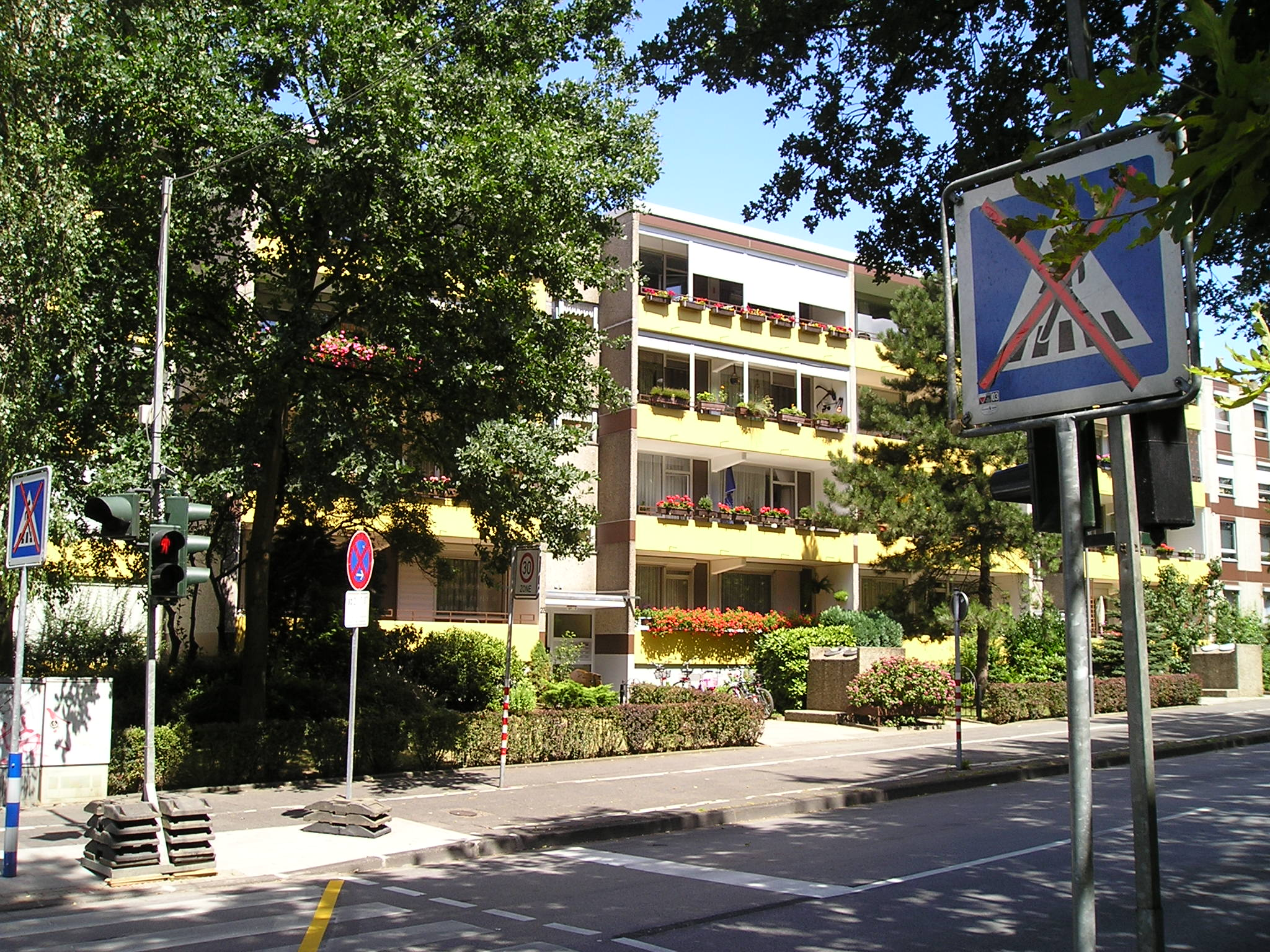 Behelfsampel an einer Kreuzung Geschwister-Scholl-Straße 72/Hegelstraße 23 in Monheim-Baumberg